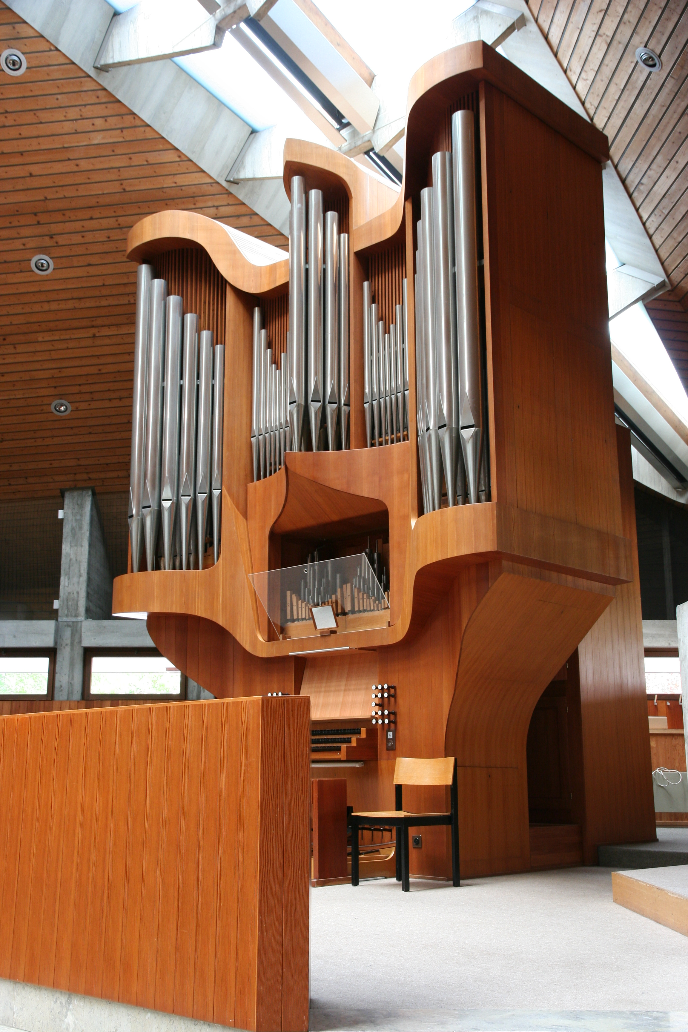 Römisch-katholische Pfarrkirche St. Elisabeth Kilchberg ZH